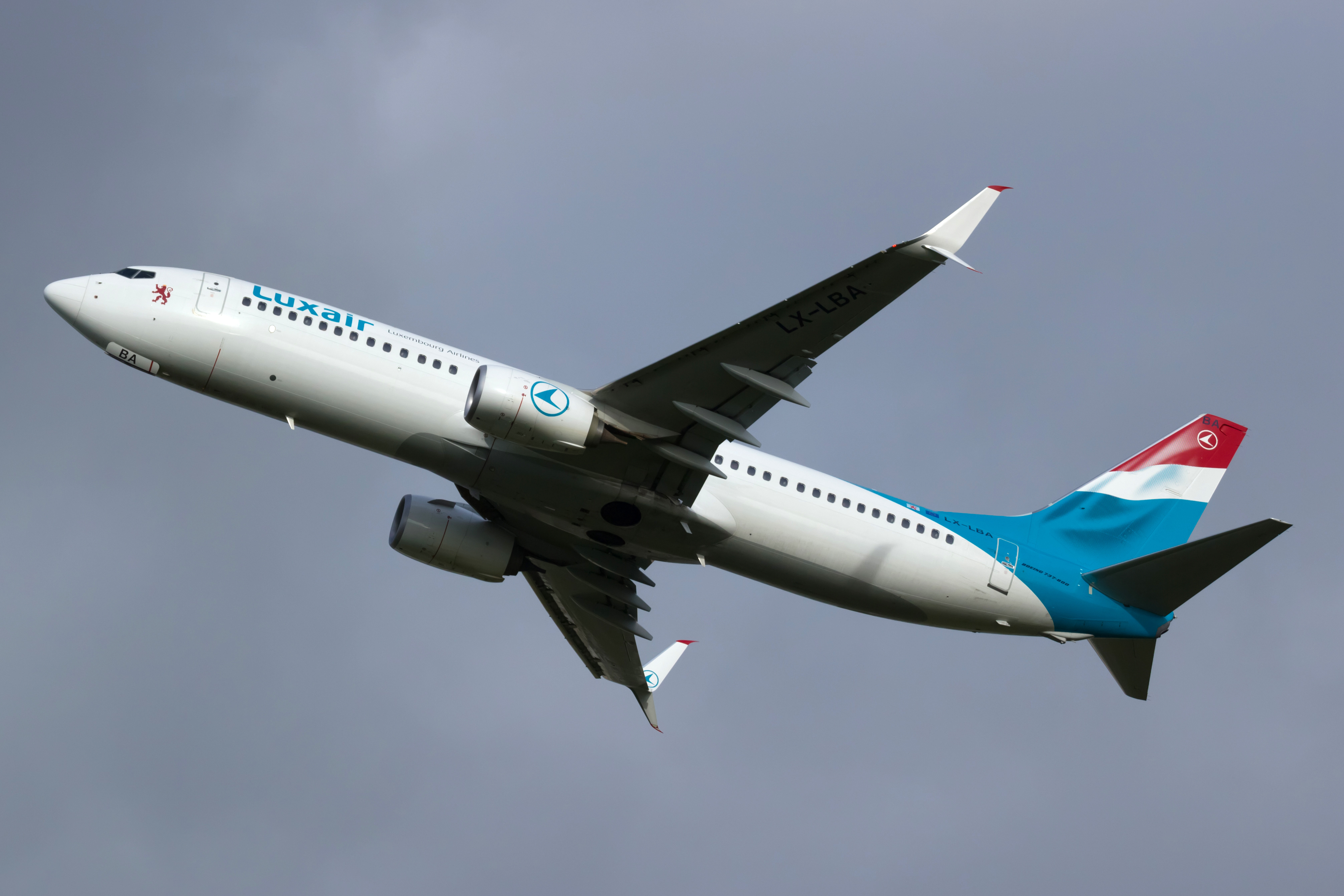 Boeing 737 de Luxair despegando do aeroporto de Lisboa.